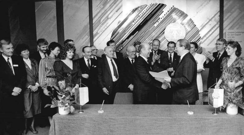 ADN-ZB Grubitzsch 6.9.88 Leipzig: Herbstmesse 88 Der Metallurgiehandel der DDR, vertreten durch Generaldirektor Dr. Peter Welzel (vorn r.), und die Stahlwerke Peine Salzgitter AG, verteten durch Ernst Pieper (M.), Vorstandsvorsitzender der Salzgitter AG, unterzeichneten einen Vertrag über das Walzen von Stahl für die Jahre 1989-1992.